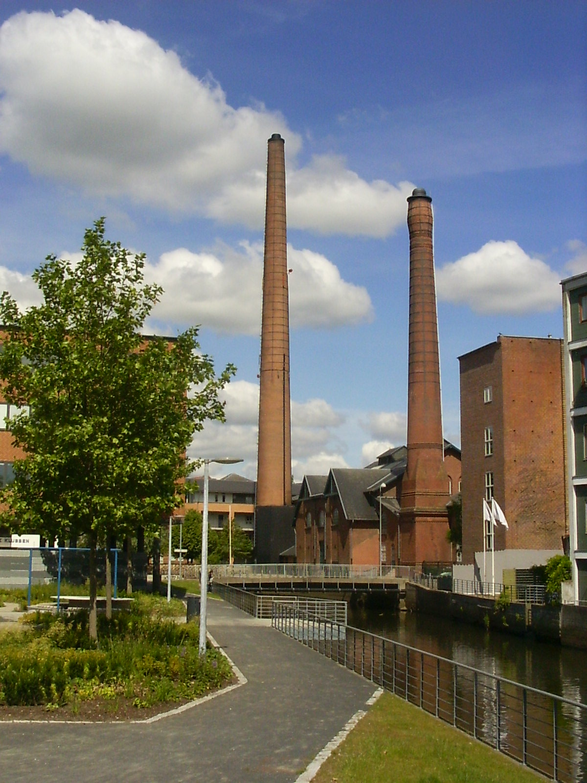 Kolding, industrieel erfgoed aan de rivier